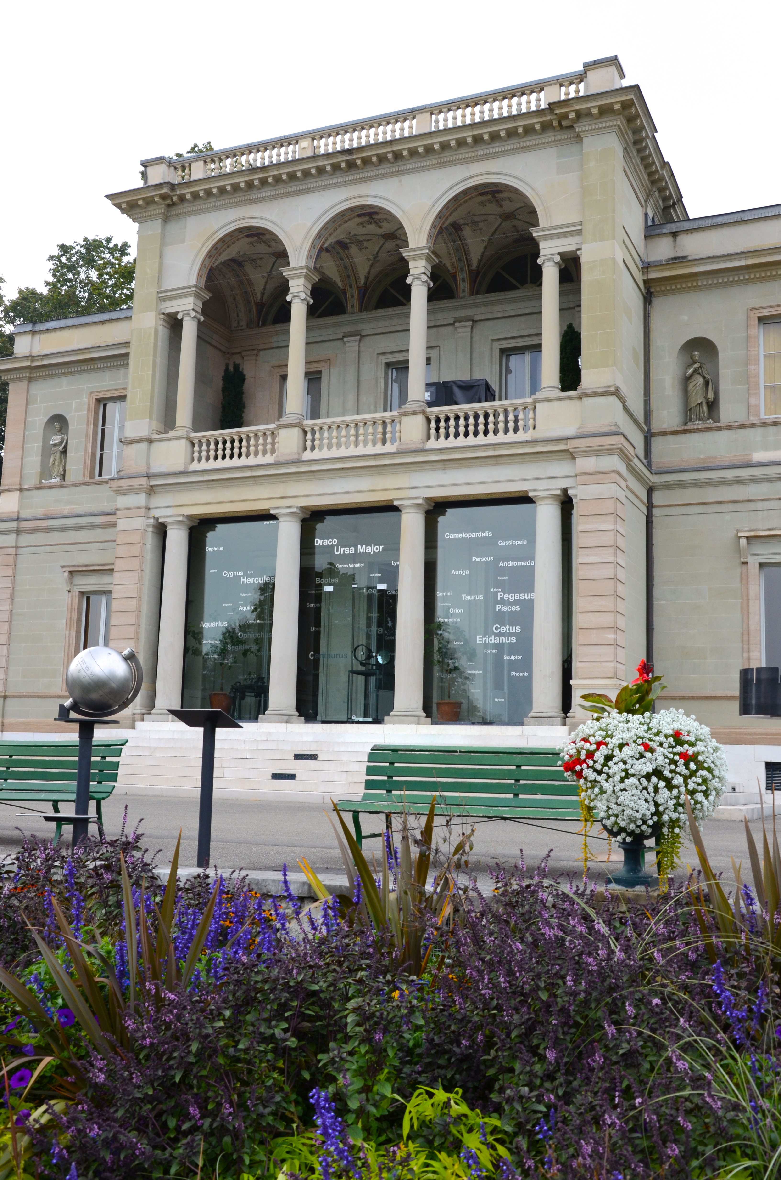 Musée d’histoire et sciences, Genève